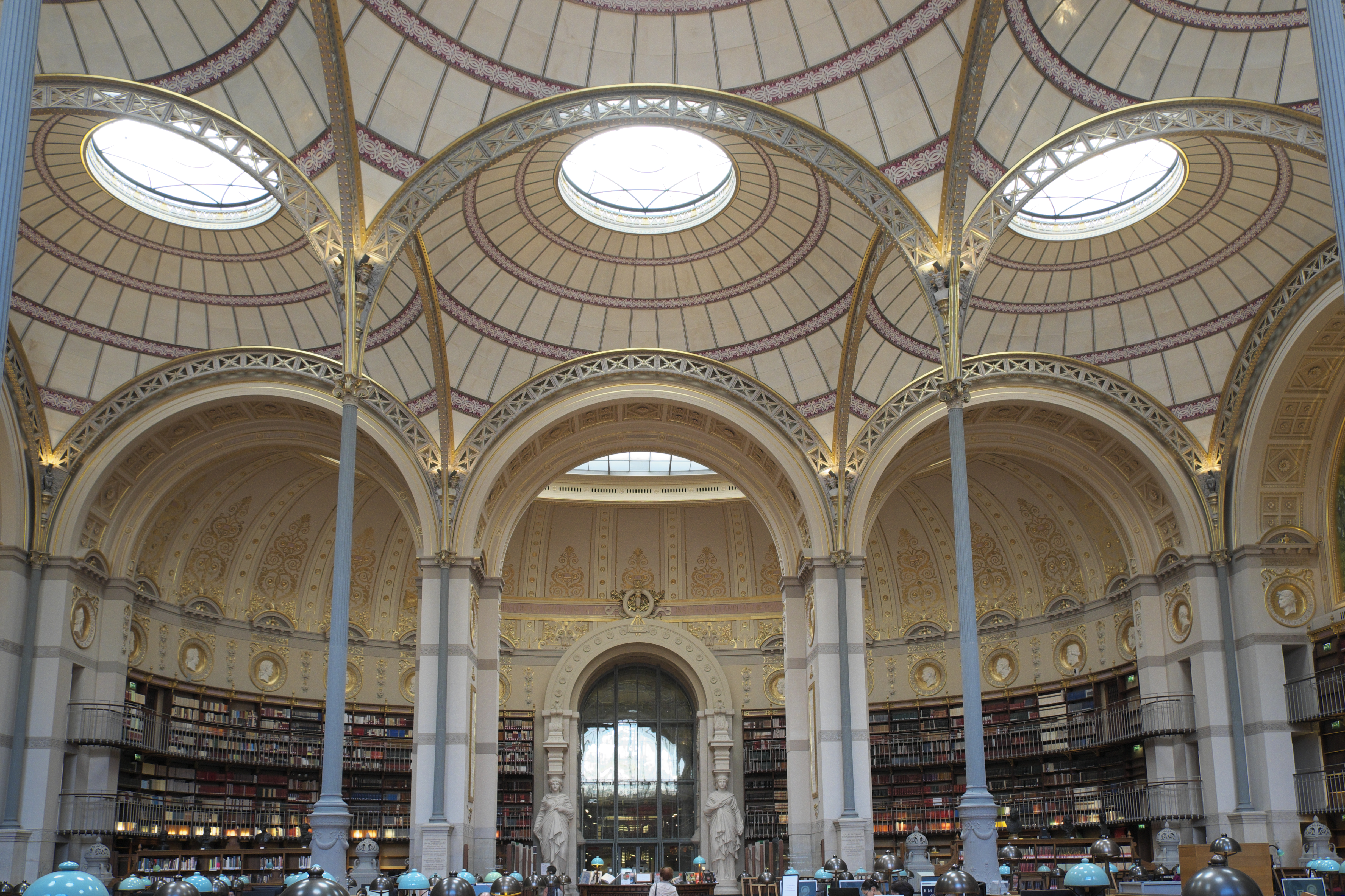 Lesesaal, Salle Labrouste, der Bibliothèque nationale de France, Site Richelieu-Louvois im 2. Arrondissement von Paris